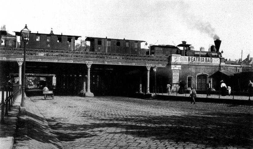 Bridge of the Verbindungsbahn over Landstraßer Hauptstraße